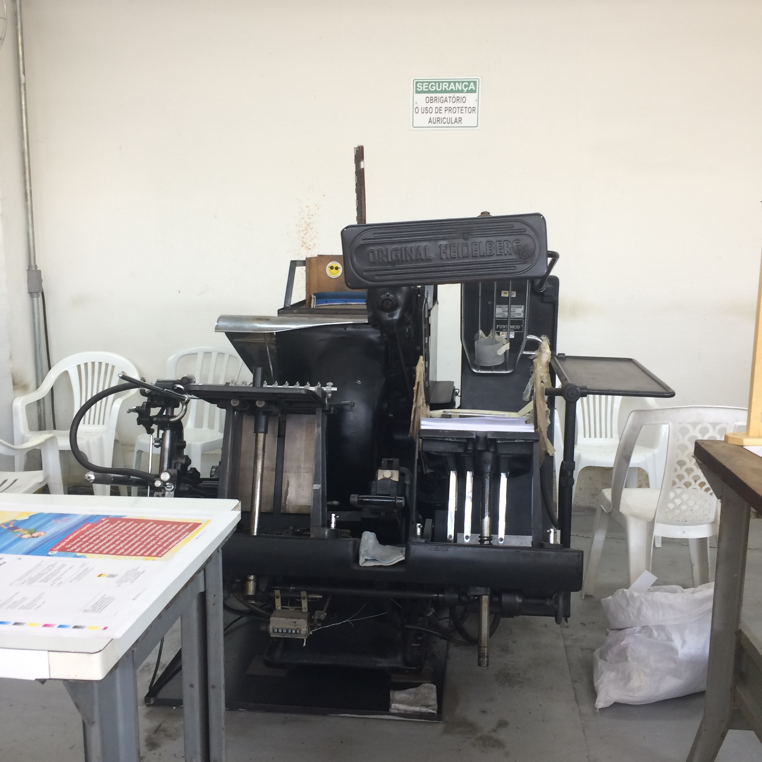 Máquina que imprime as páginas em braille